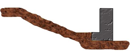 schema fossato ac, sbarr drava